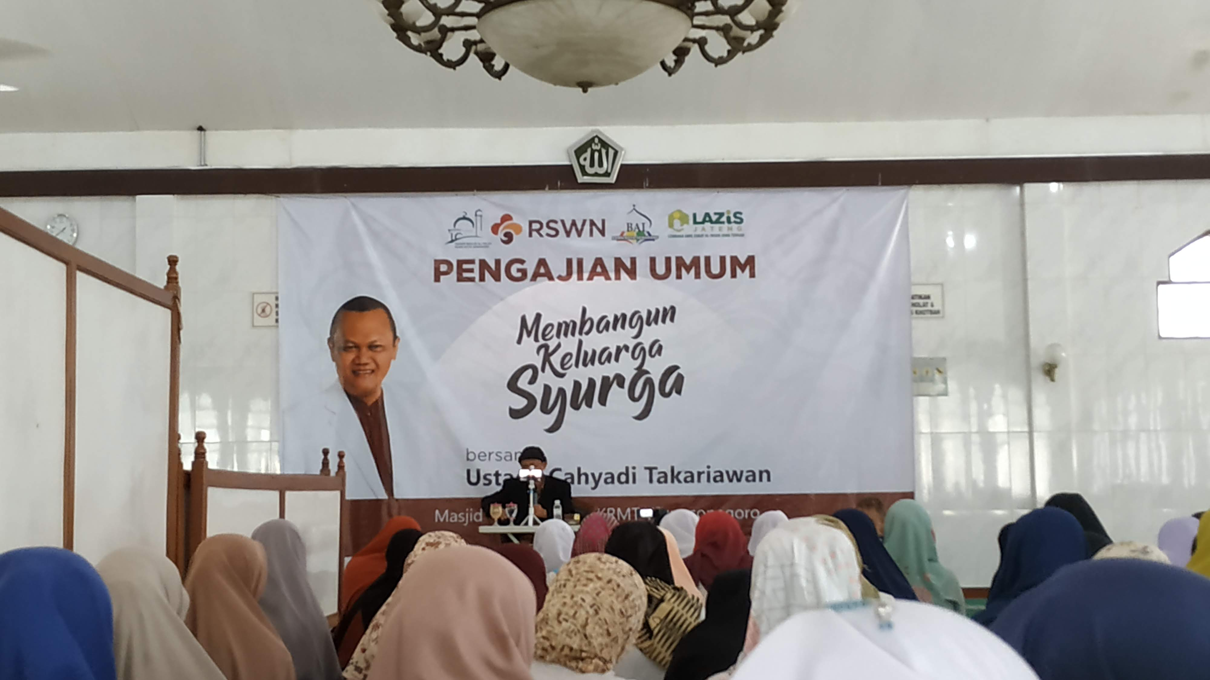 Pak Cahyadi di RS Wongsonegoro Semarang